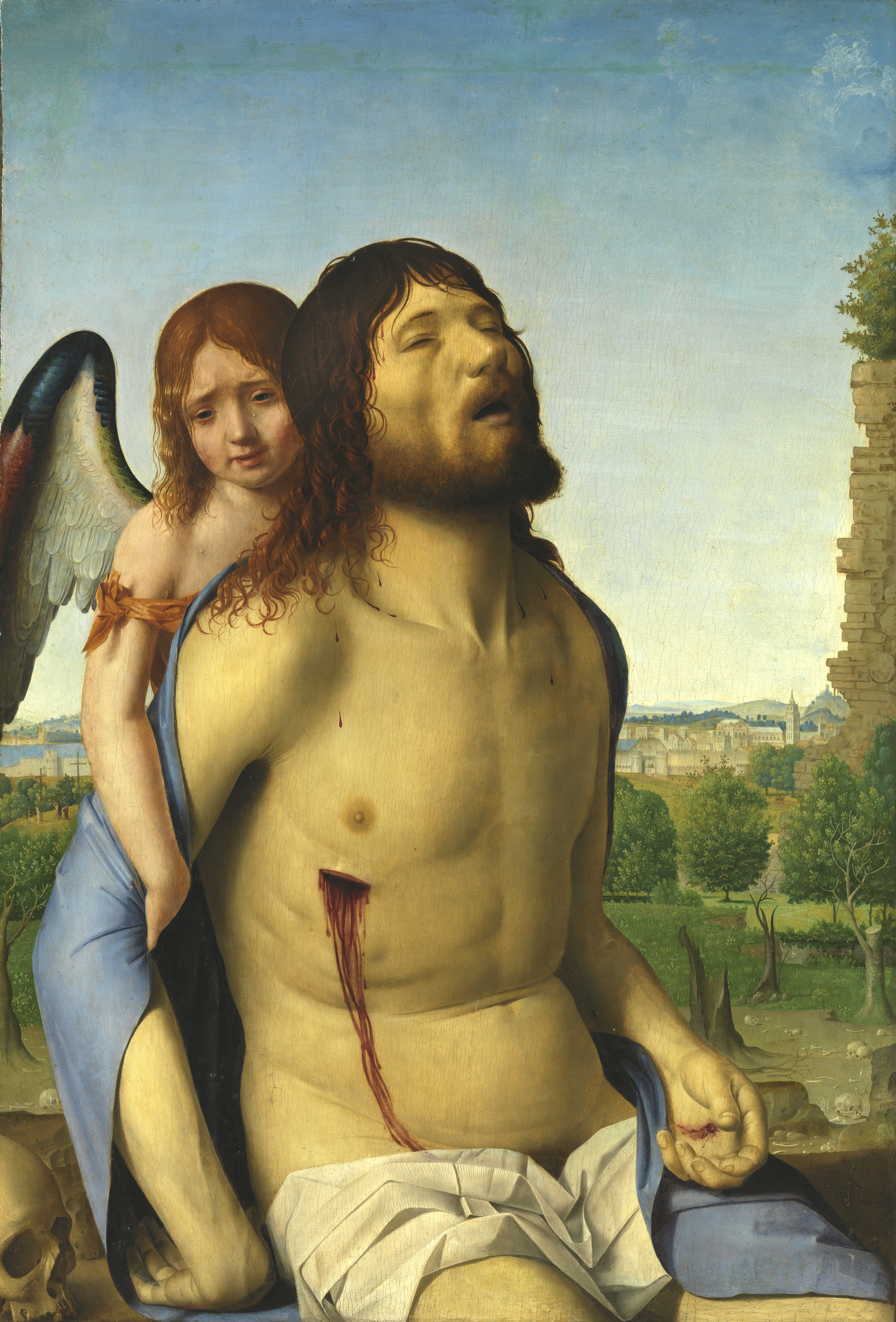 En la pintura de Antonello, de gran virtuosismo técnico, convive una caligrafía minuciosa de origen nórdico, perceptible en el paisaje o el cabello de Cristo, con un tratamiento monumental de la anatomía y una preocupación por el volumen y la perspectiva claramente meridionales.